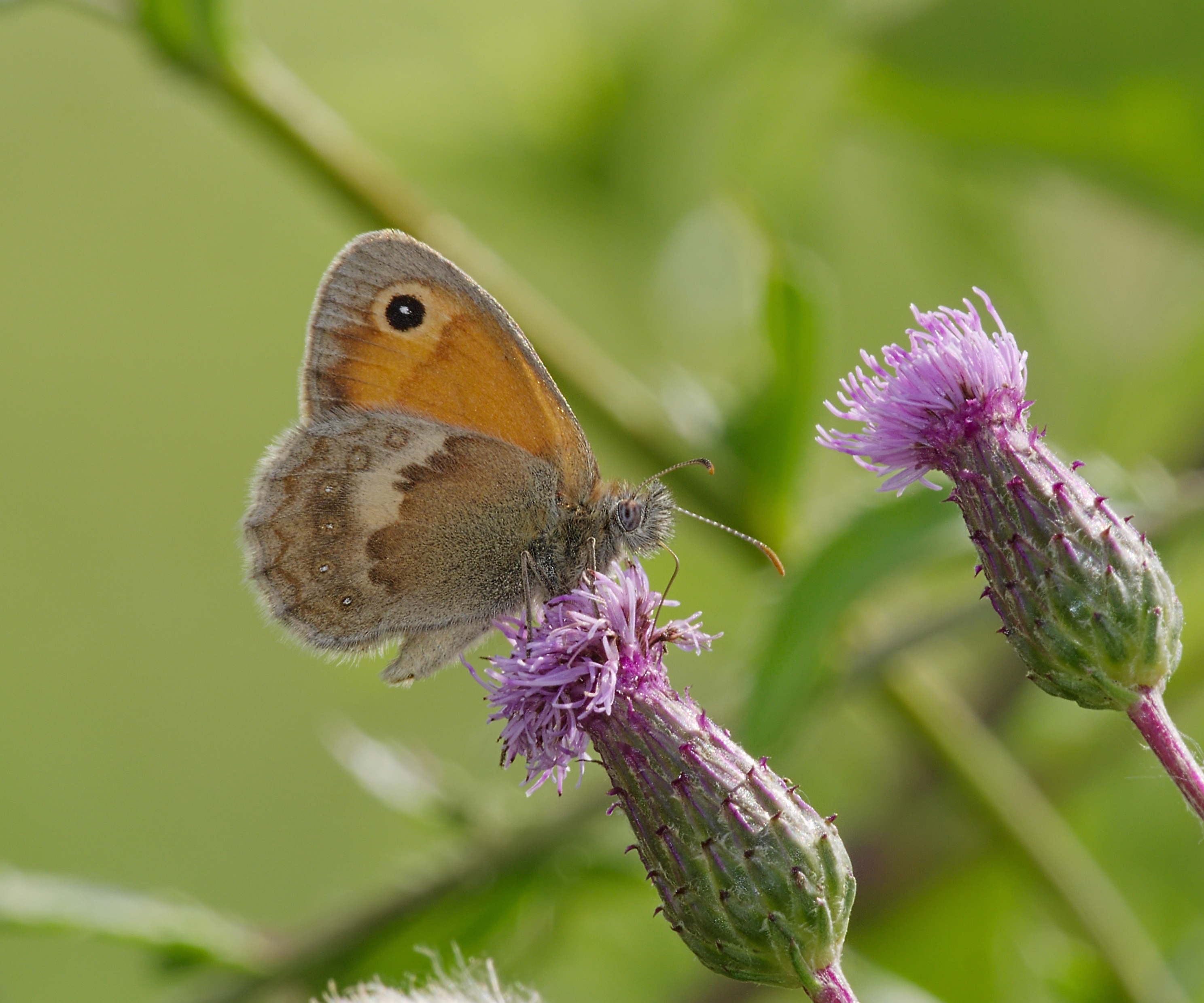 Kleines Wiesenvögelchen - Coenonympha pamphilus. Aufgenommen am Erlichsee in Oberhausen-Rheinhausen, Baden-Württemberg, Deutschland.